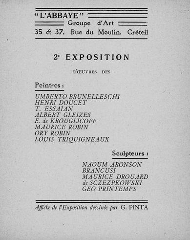 Programme 2eme exposition Abbaye de Créteil